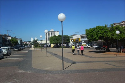 Vista Centro Muzambinho